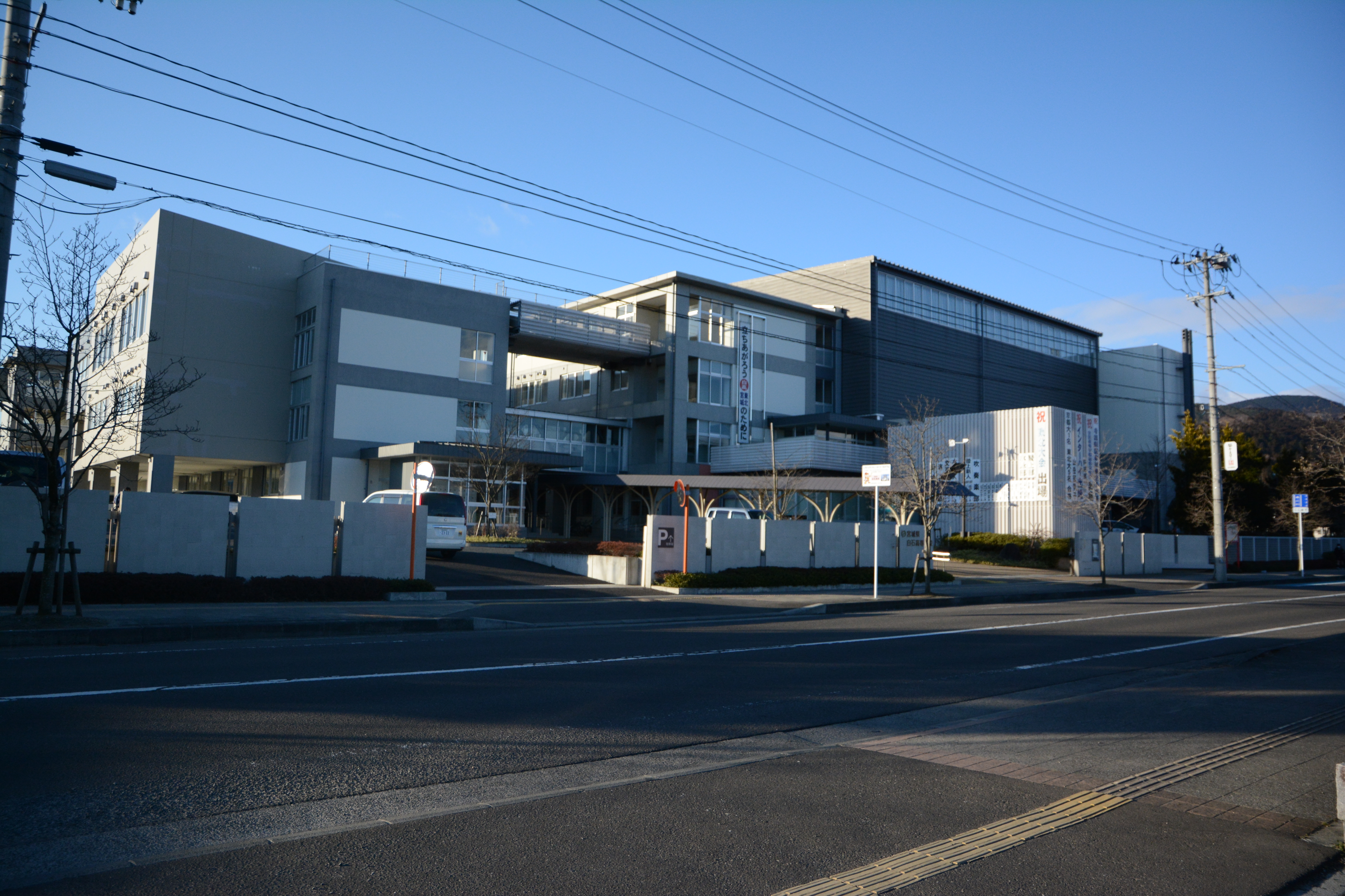 宮城県白石高校の校舎の写真です。